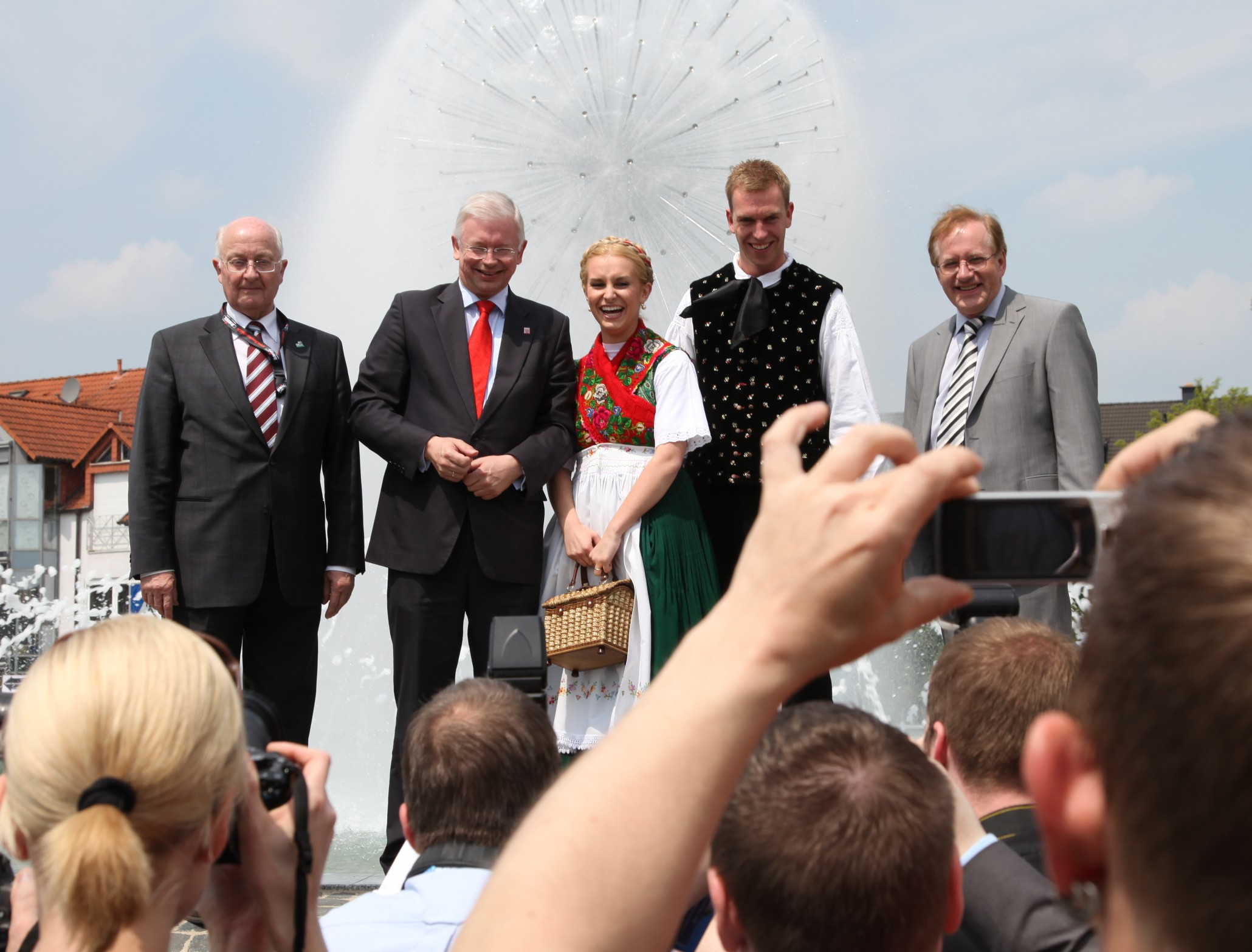 Hessentagspaar 2010, Mona-Lorena Monzien und Fabian Gies (3. und 4. von links) beim Hessentag in Stadtallendorf mit Bürgermeister Manfred Vollmer (ganz links), Ministerpräsident Roland Koch (2. von links) und dem Hessentagsbeauftragten des Landes, Heinrich Kaletsch.